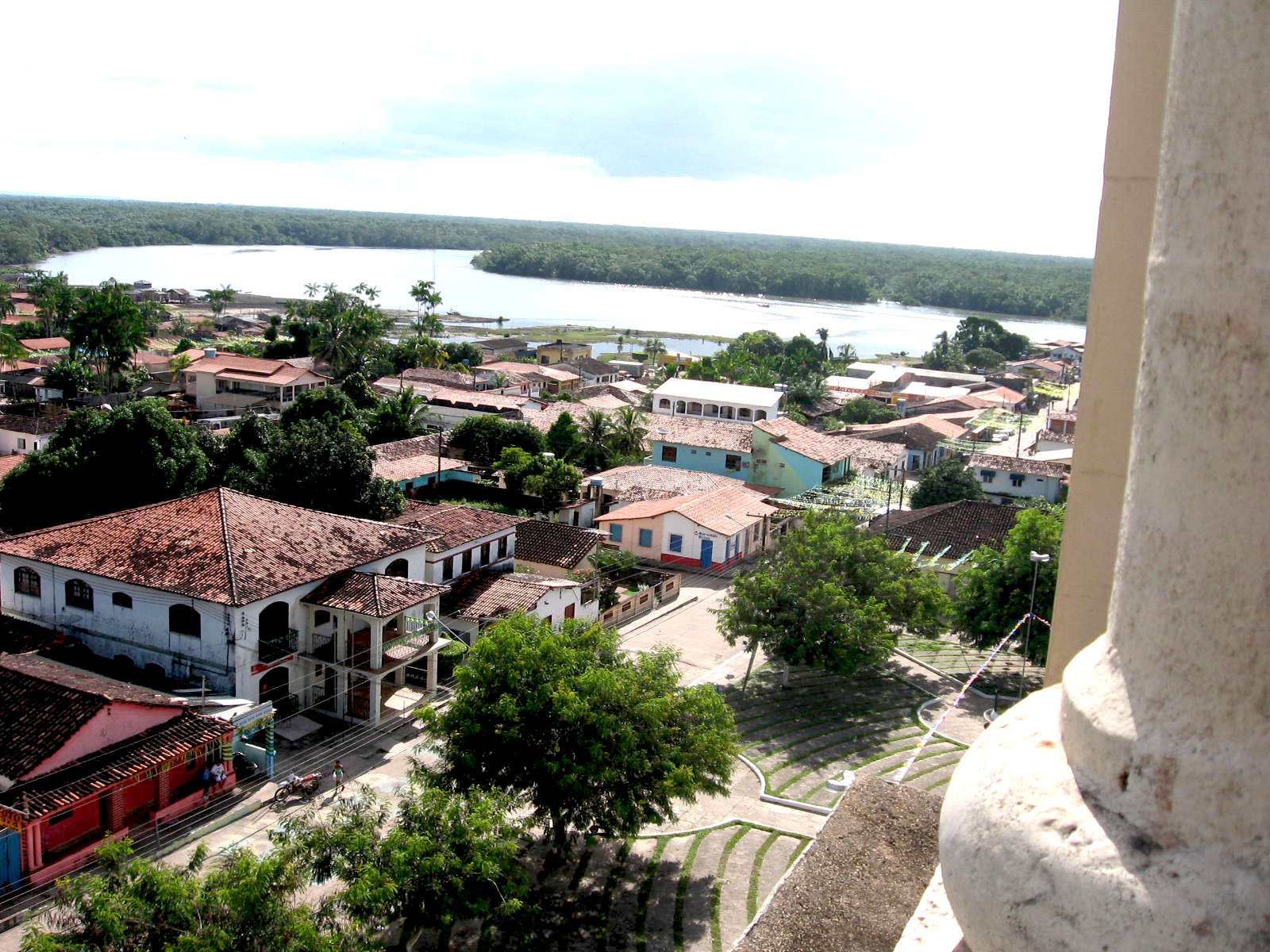 foto mostrando o centro da cidade de Carutapera-Ma